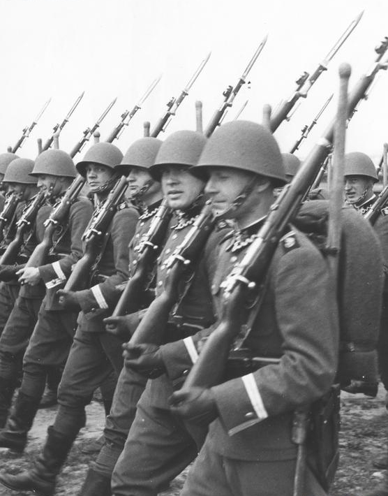 Uroczystości 3 Maja w Warszawie: Oddział ze szkoły podchorążych inżynierii przed defiladą.